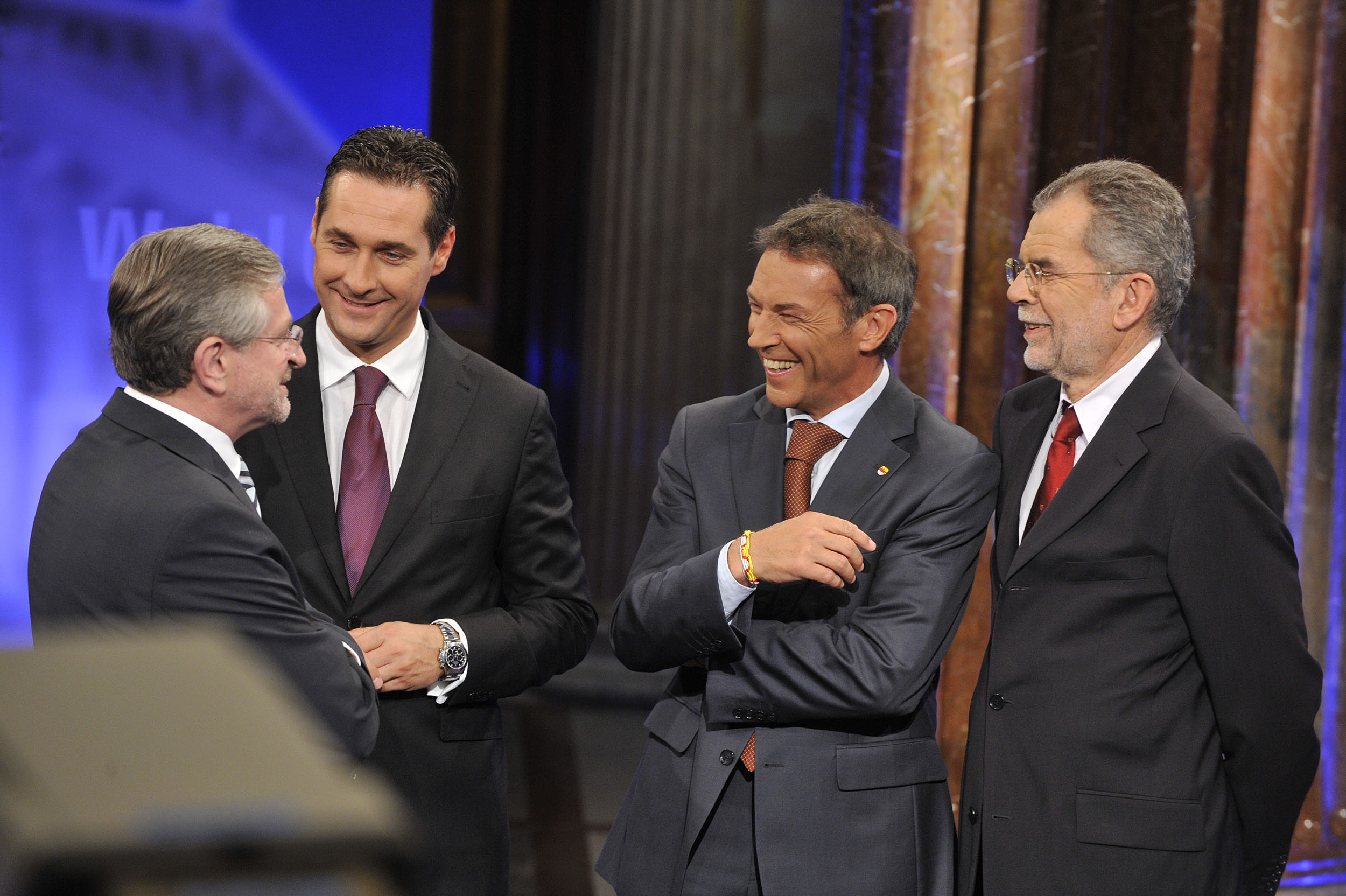 TV-Diskussion der Spitzenkandidaten (Foto: SPÖ/Zinner)